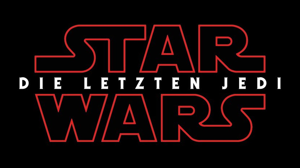 Deutscher Titel von Star Wars: Episode 8